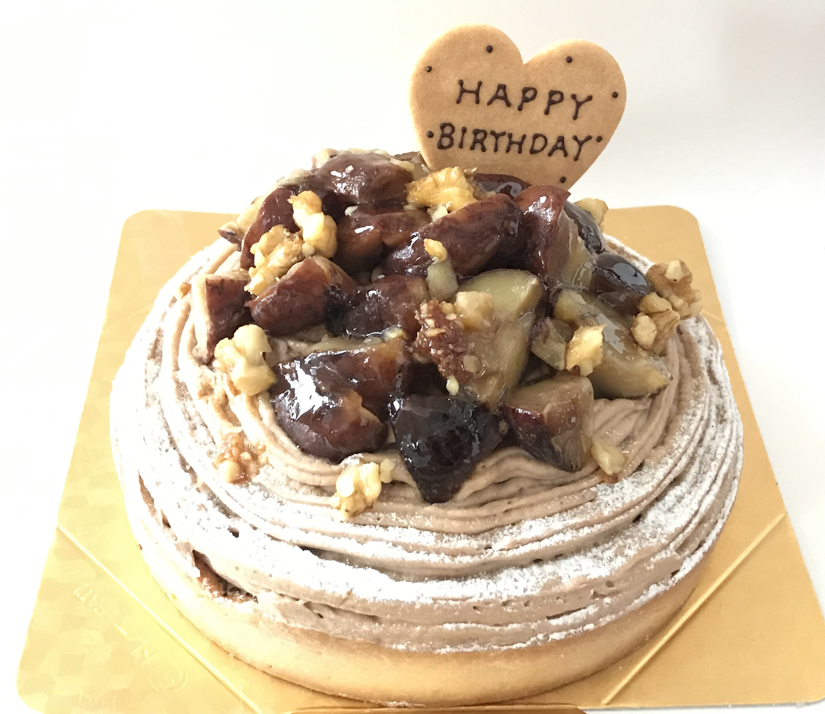 長野県の洋菓子店『Esquisse』の栗とコーヒーのほろ苦タルト16cm;3800円（送料別・消費税別）